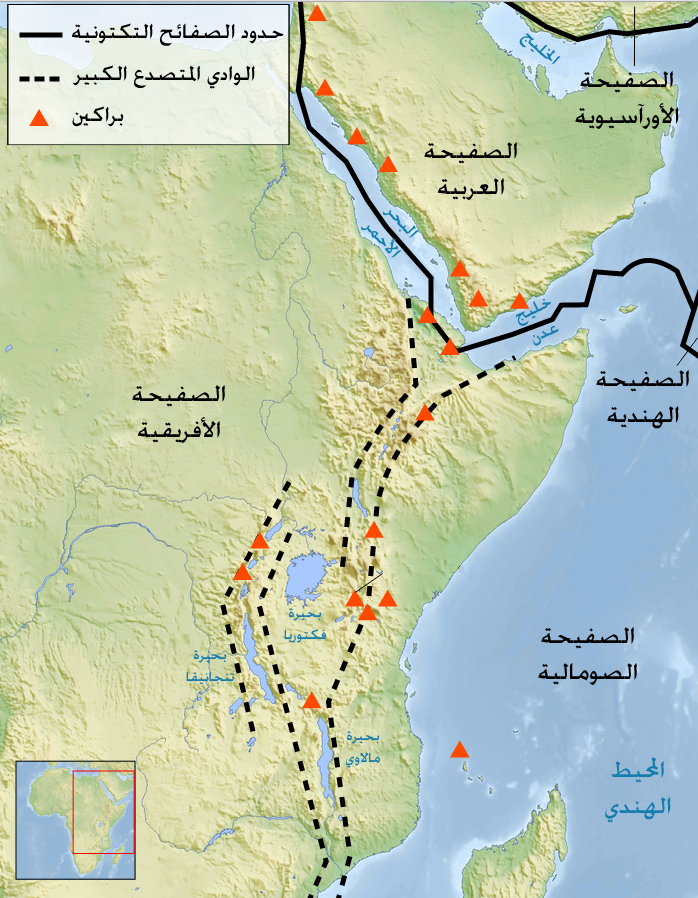 .خريطة الوادي المتصدع الكبير وصفائحه التكتونية